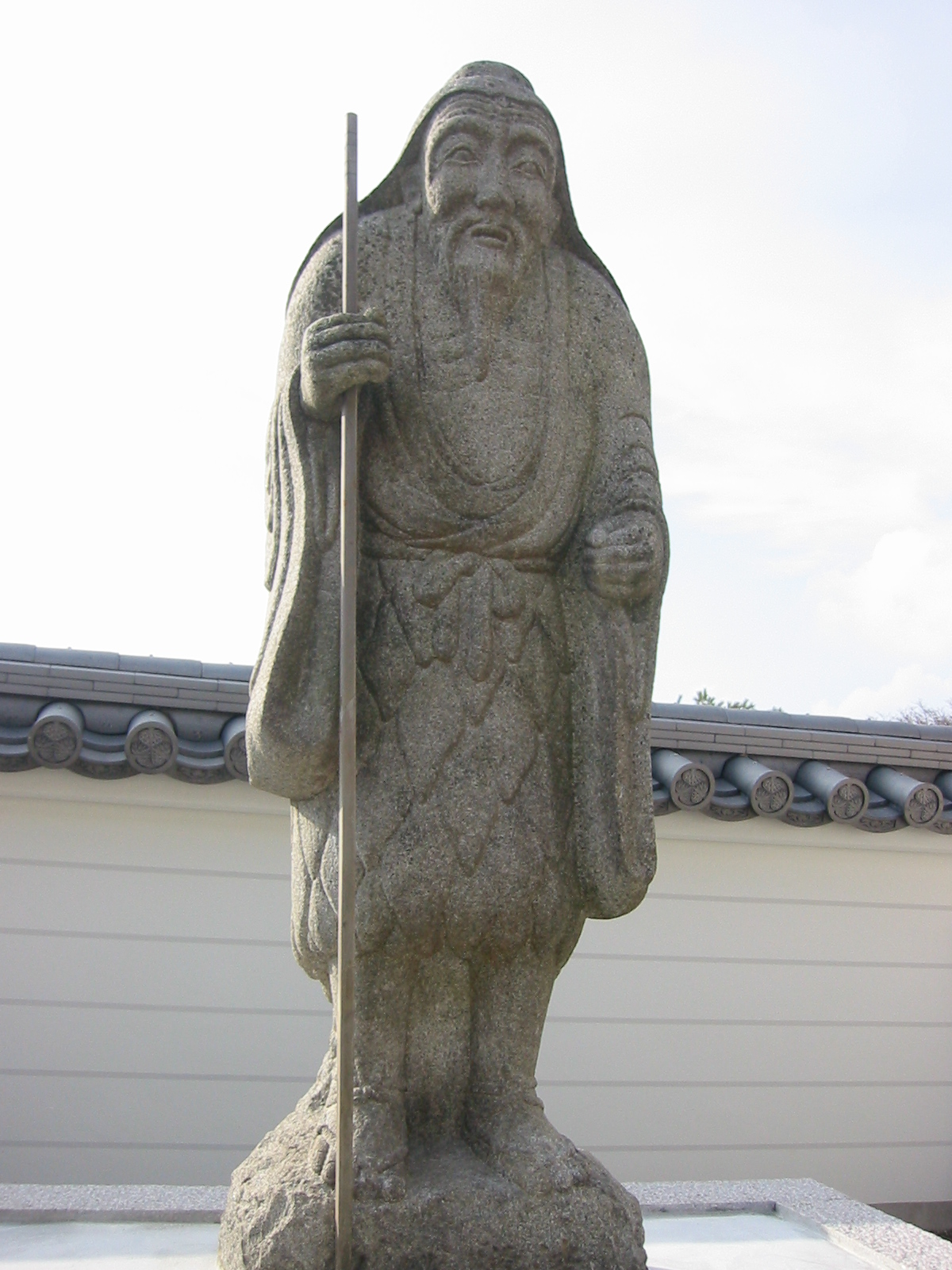 法道仙人 忉利天上寺